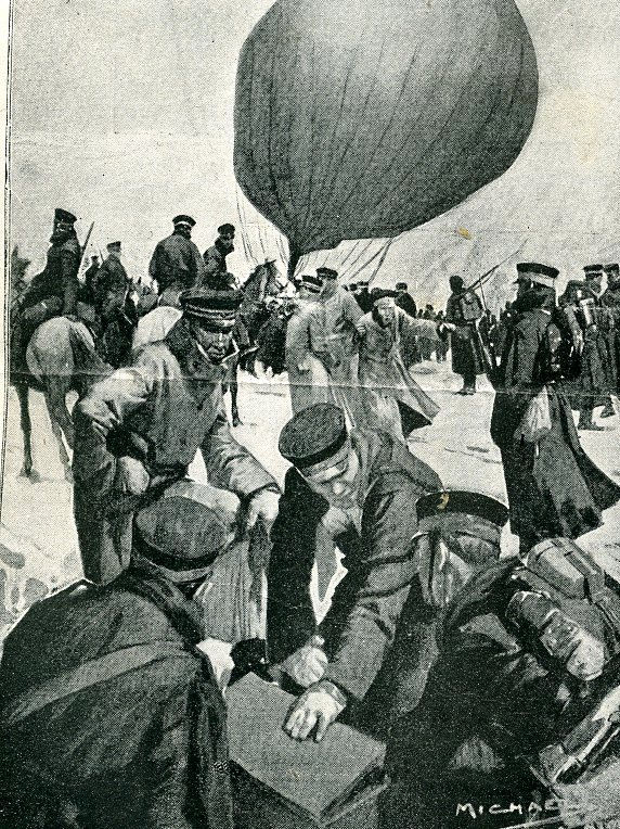 Les opérations du Japon en Corée. Une reconnaissance militaire en ballon des montagnes au nord du Ping Yang